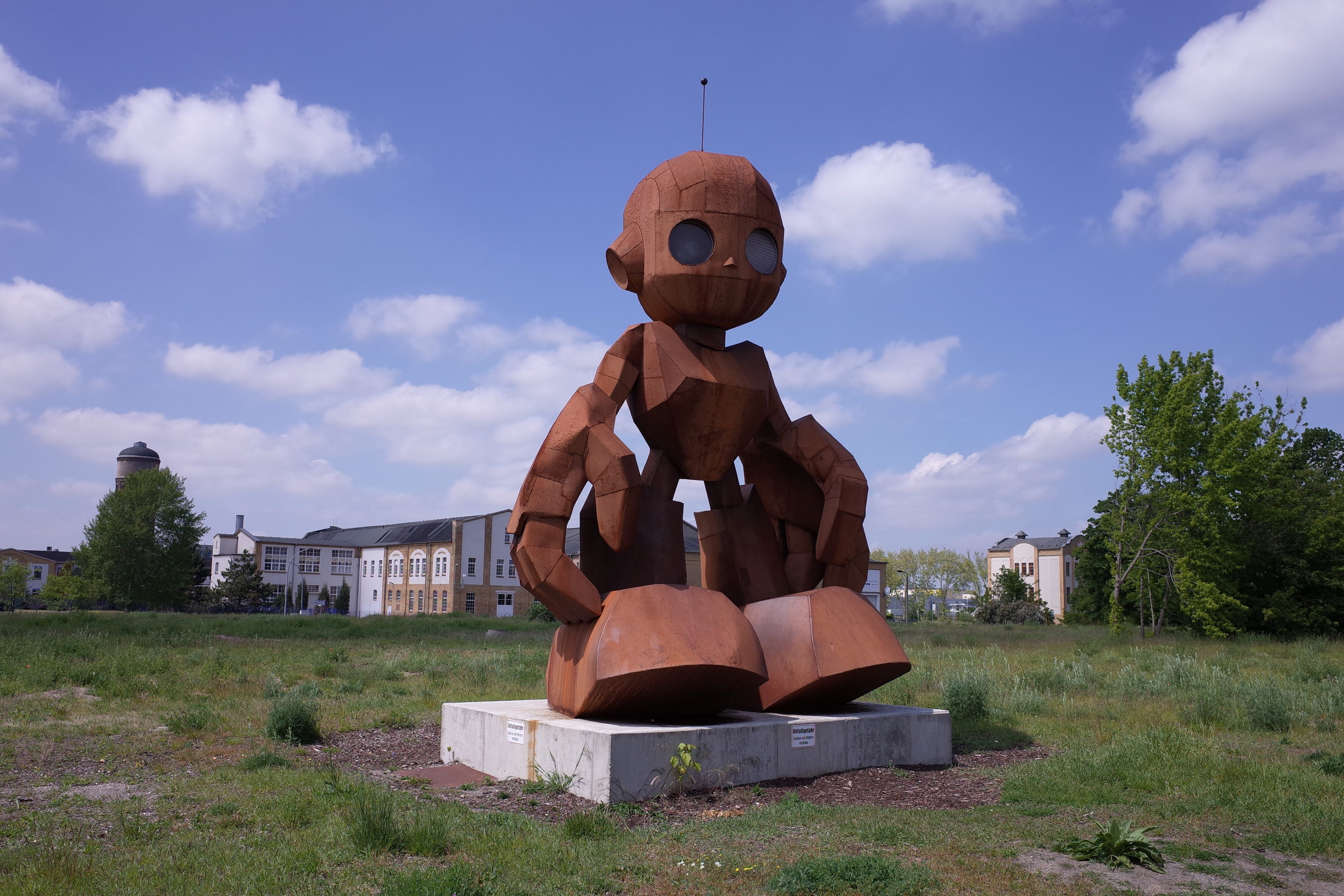 Roboterskulptur vor dem Rathaus in von Bitterfeld-Wolfen. Die Skulptur ist ein Werk vom Künstler Raik Dalgas.